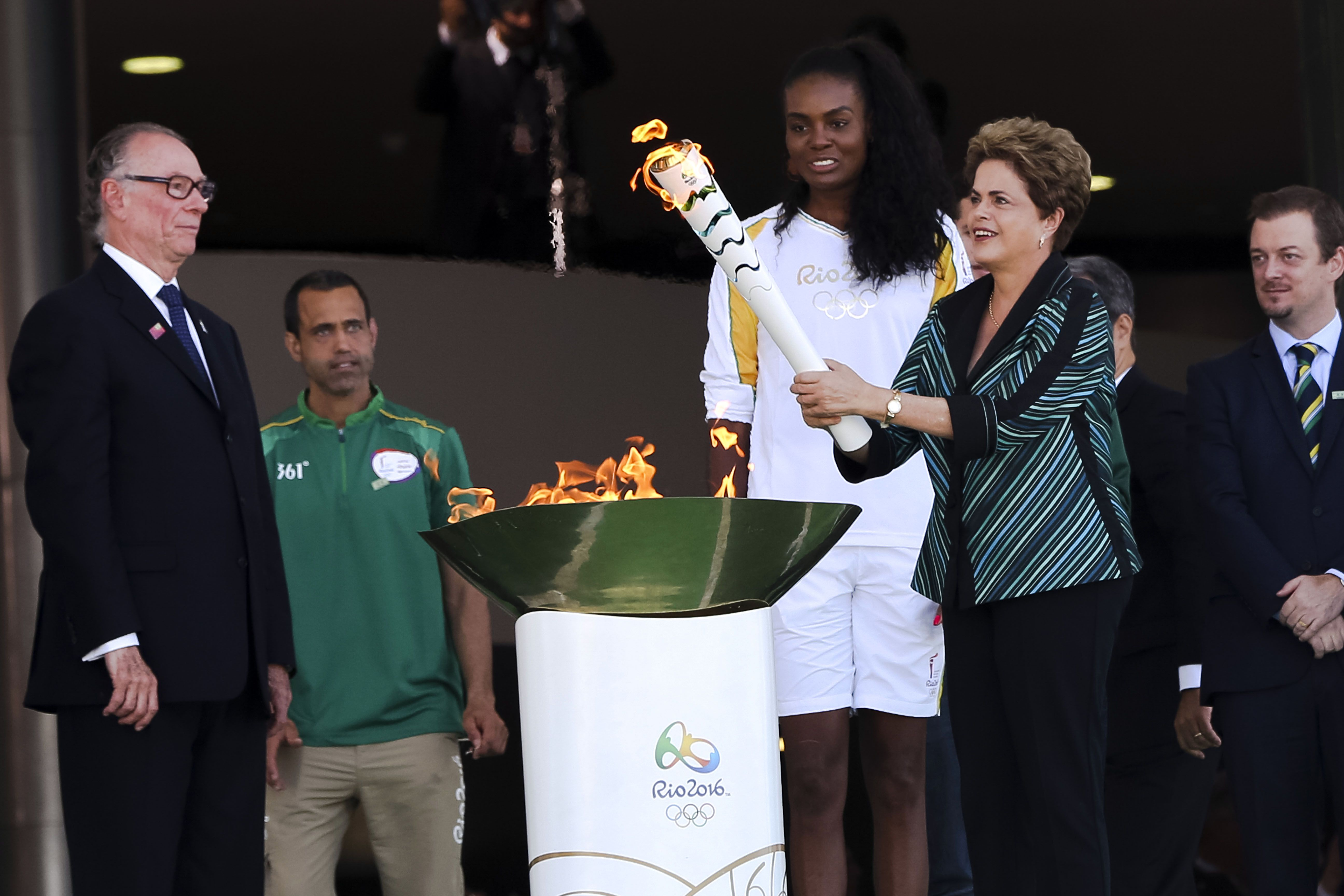 Brasília - Presidenta Dilma durante cerimônia que marca o início do revezamento da Tocha Olímpica no Brasil